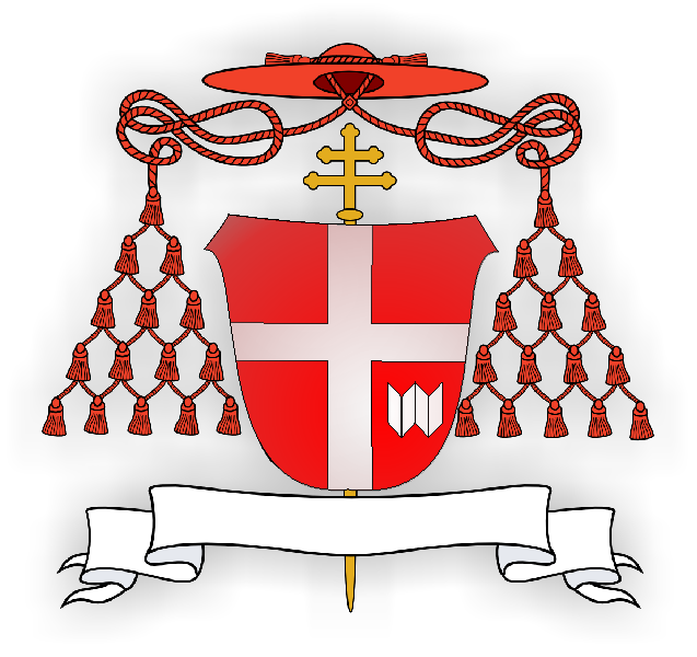 herb kardyłała Oleśnickiego; cardinal Olenicki COA